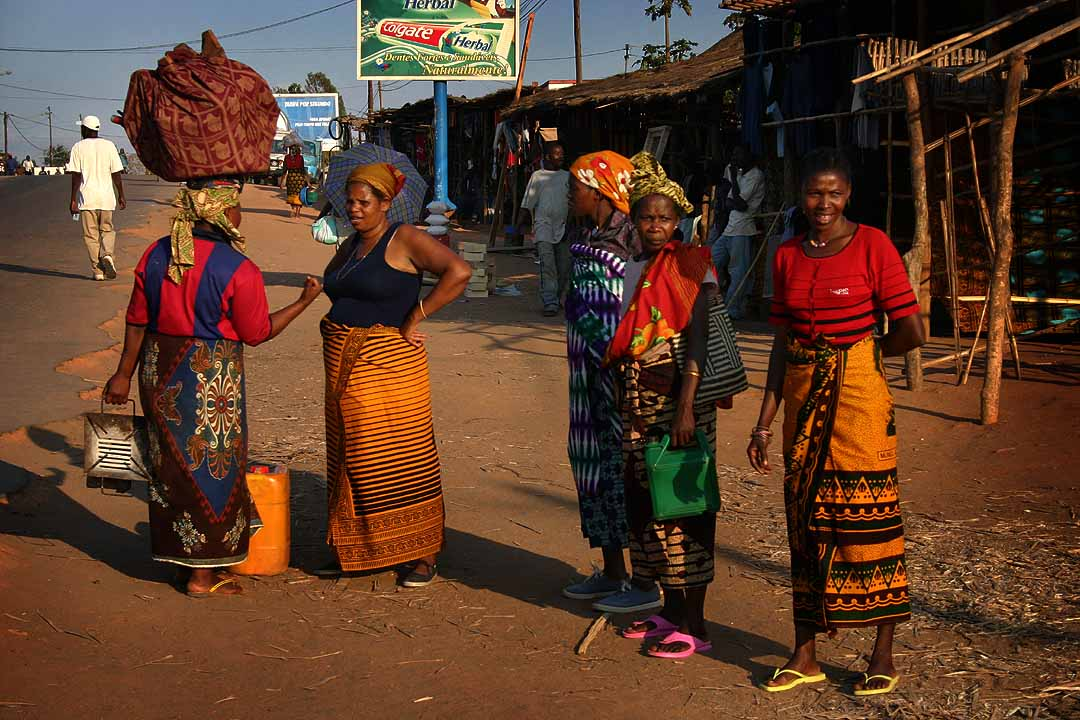 Makhuwa women in Nampula, MozambiqueMozambique